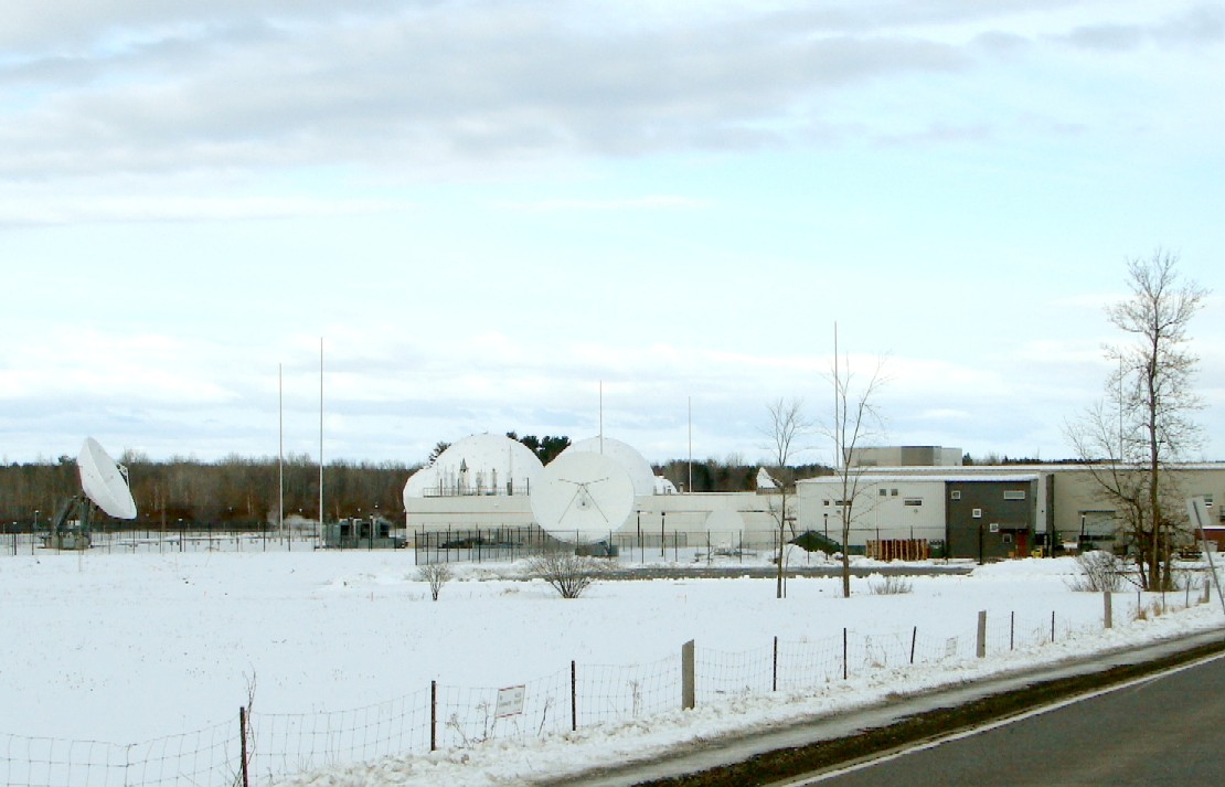 CFS Leitrim, Ottawa, Ontario, Canada